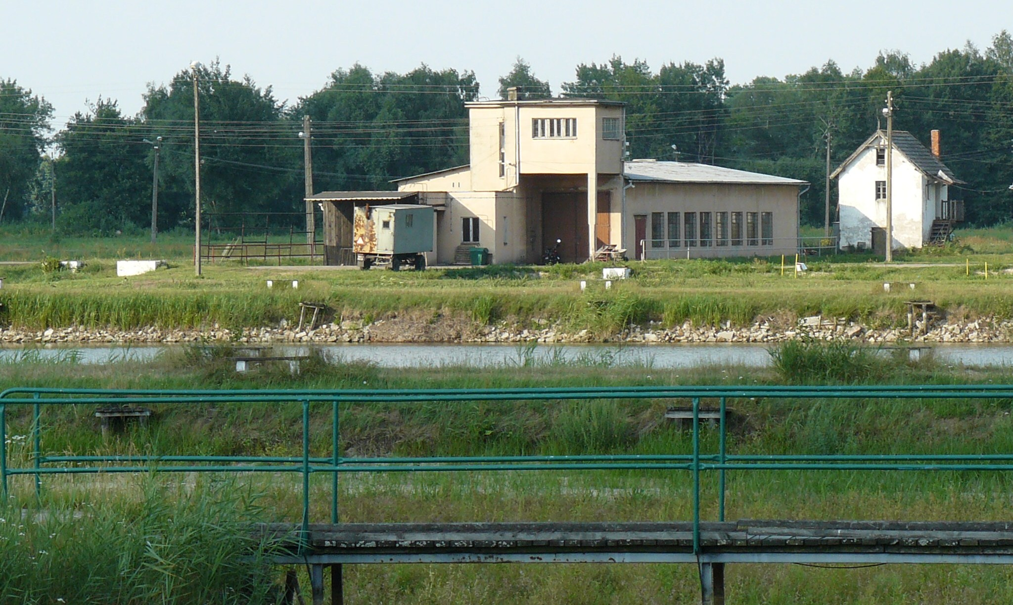 Ruda Sułowska - gospodarstwo rybackie (Stawy Milickie).